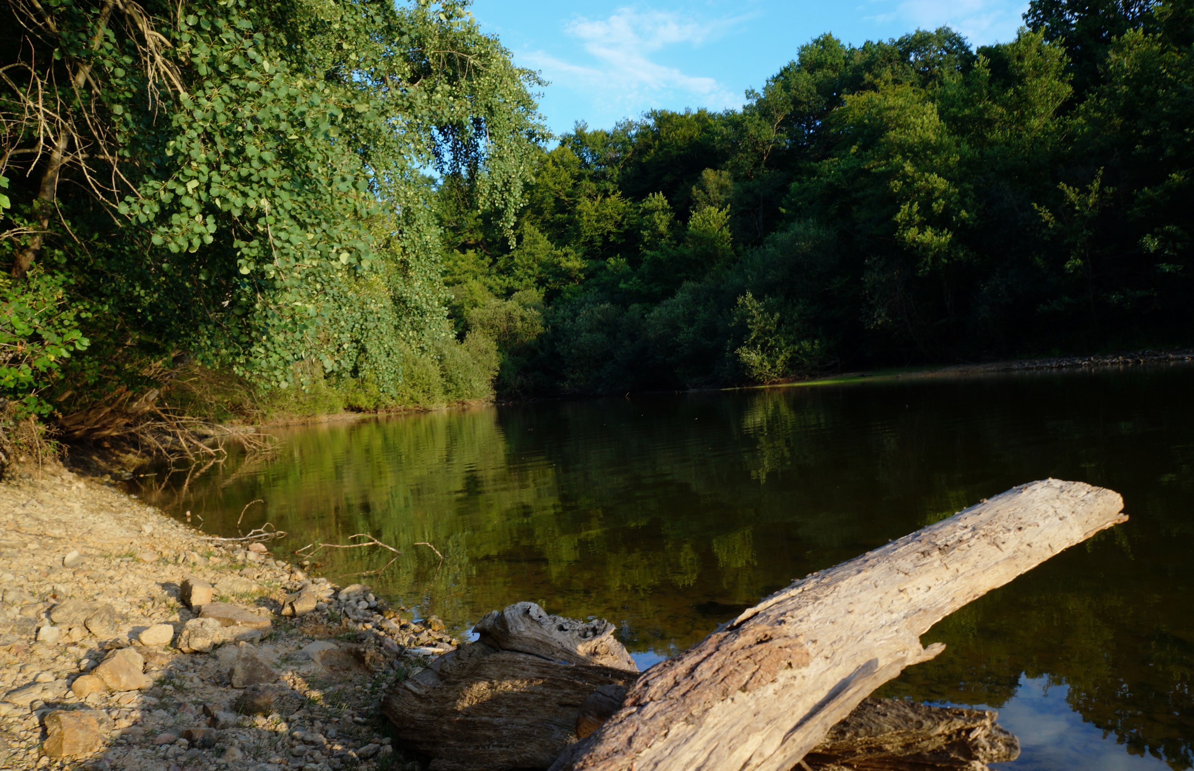 L'un des grands étangs de la Forêt de Tronçais. En été, les touristes et baigneurs peuvent venir s'y baigner. Présence d'une plage.